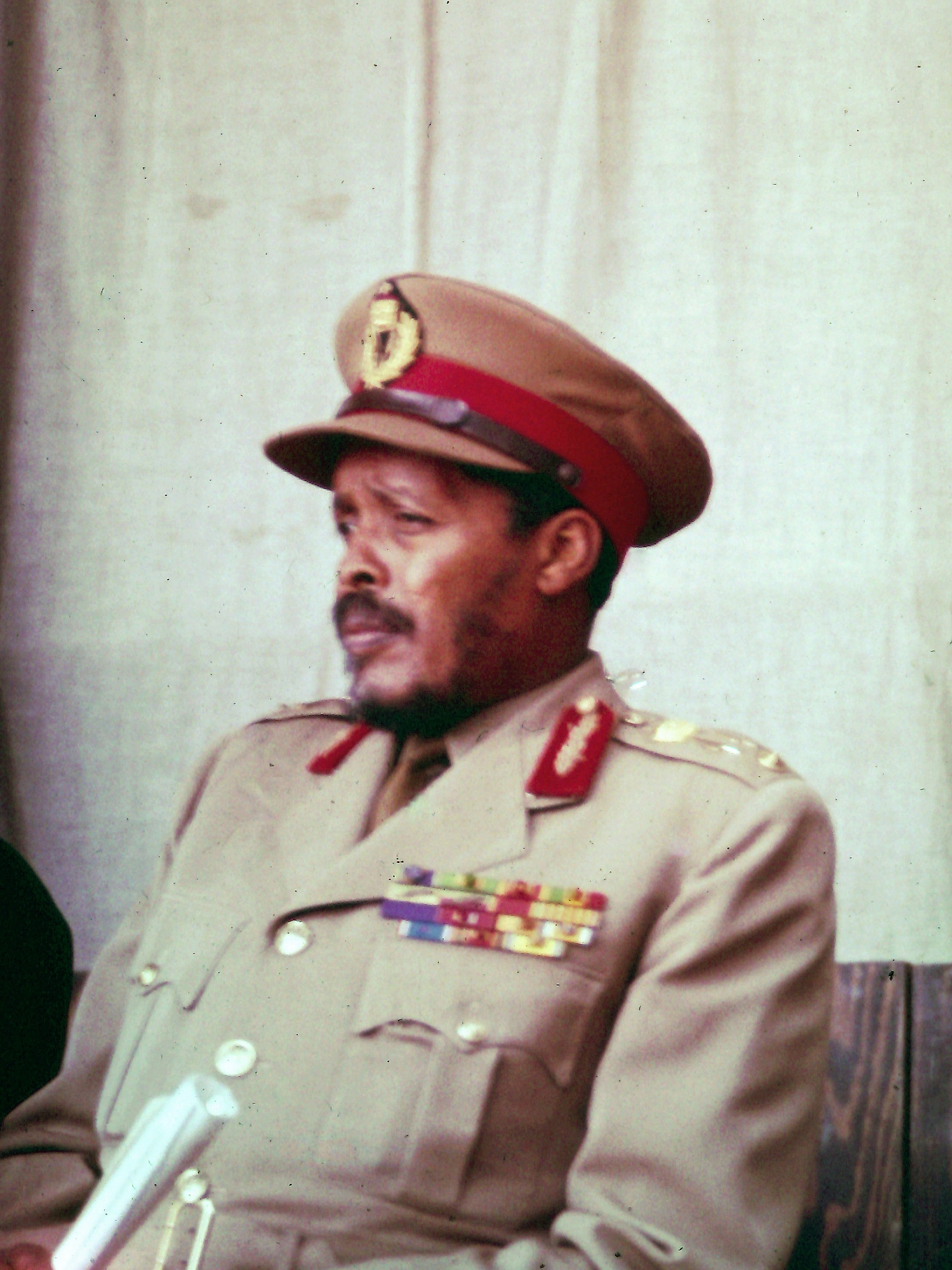 The picture was taken i December 1959, at the inauguration of Building College in Addis Ababa, Ethiopia.